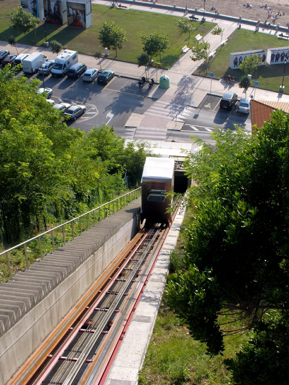 Ascensor de Ereaga y módulos de una exposición de Getxo Photo 2010, Algorta, Guecho (Vizcaya).